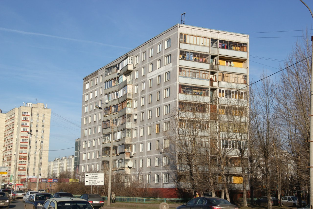 панельный дом 121-й серии в г. Казань